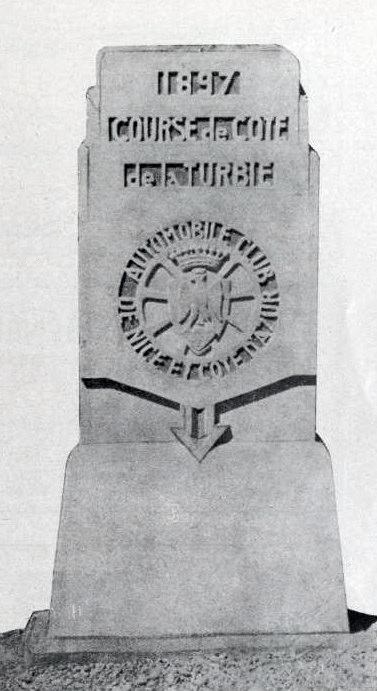 Monument-hommage pour la première côte Nice-La Turbie, à La Turlie.